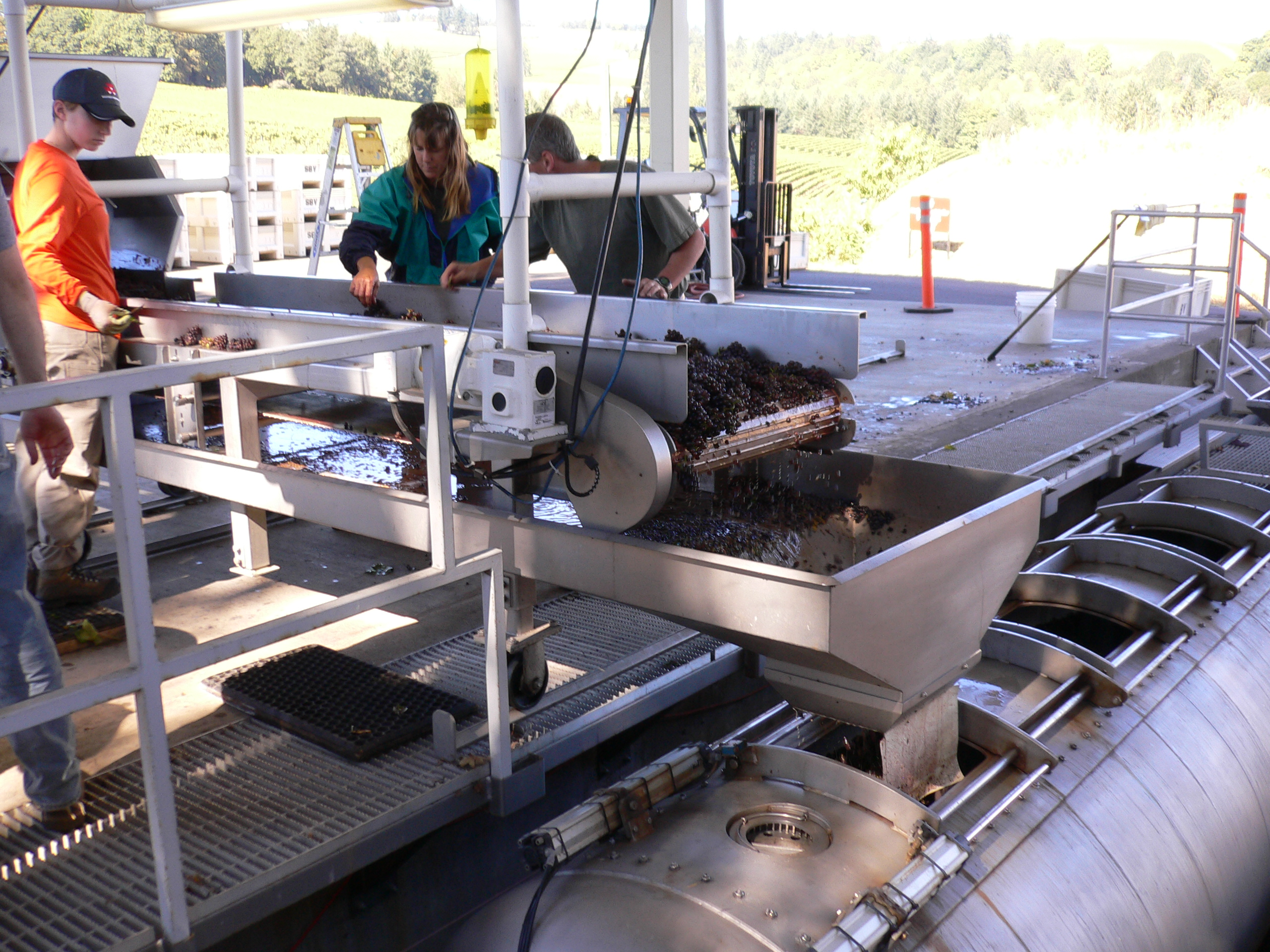 Sokol Blosser Winery, Willamette Valley, Oregon